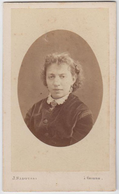 Здымак 1870-х гг., зроблены ў Гродне ў фотамайстэрні Садоўскага.